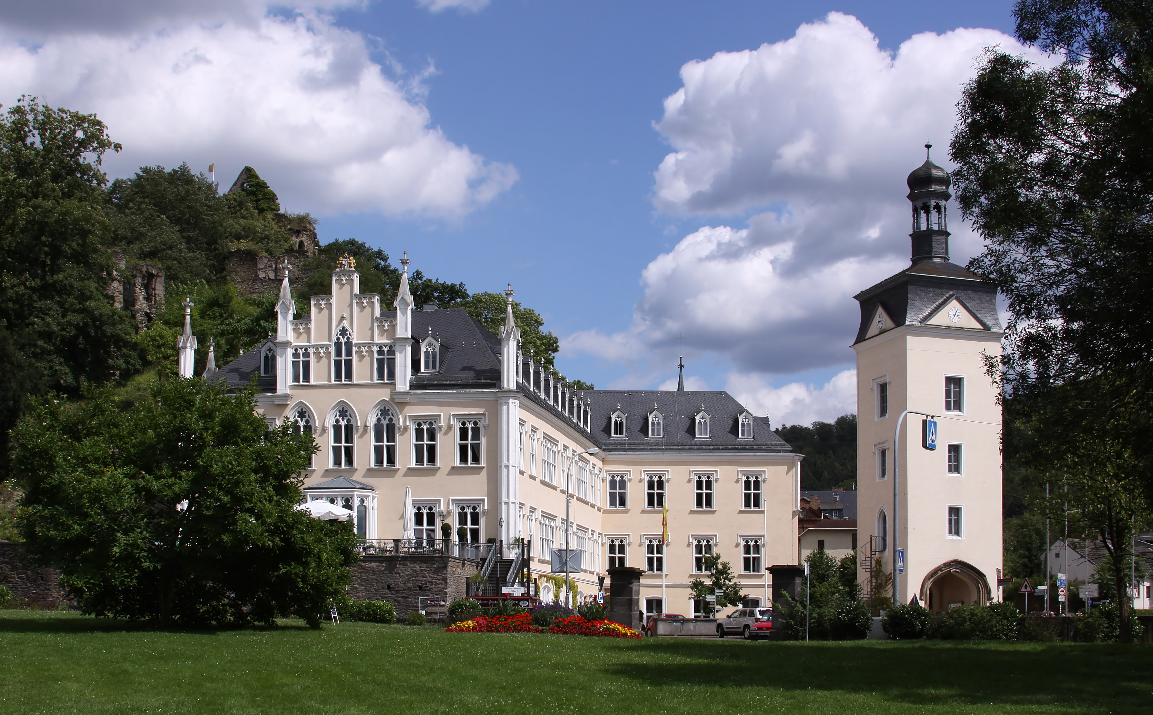 Schloss Sayn in Bendorf bei Koblenz/Deutschland